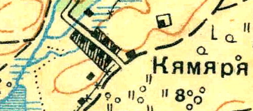 Топографическая карта Ленинградской области, квадрат О-36-13-А-а (Большая Пудость), деревня Кямяря